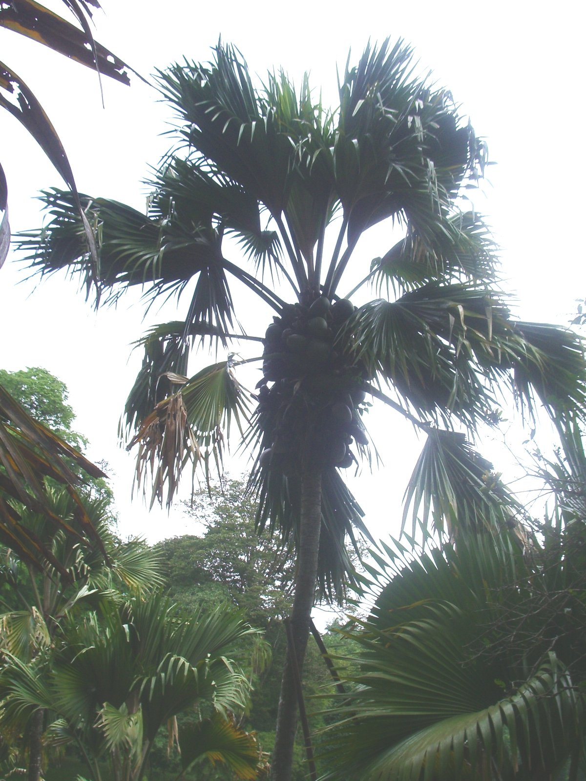 Palmera de les Seychelles. Aquesta palmera només existeix a les illes i al jardi botanic de Peradeniya a a Sri Lanka on es creu que va arribar merces a una llavor portada per la mar; foto feta per J. Ollé el juliol del 2006